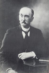 portrait de Paul VIEILLE